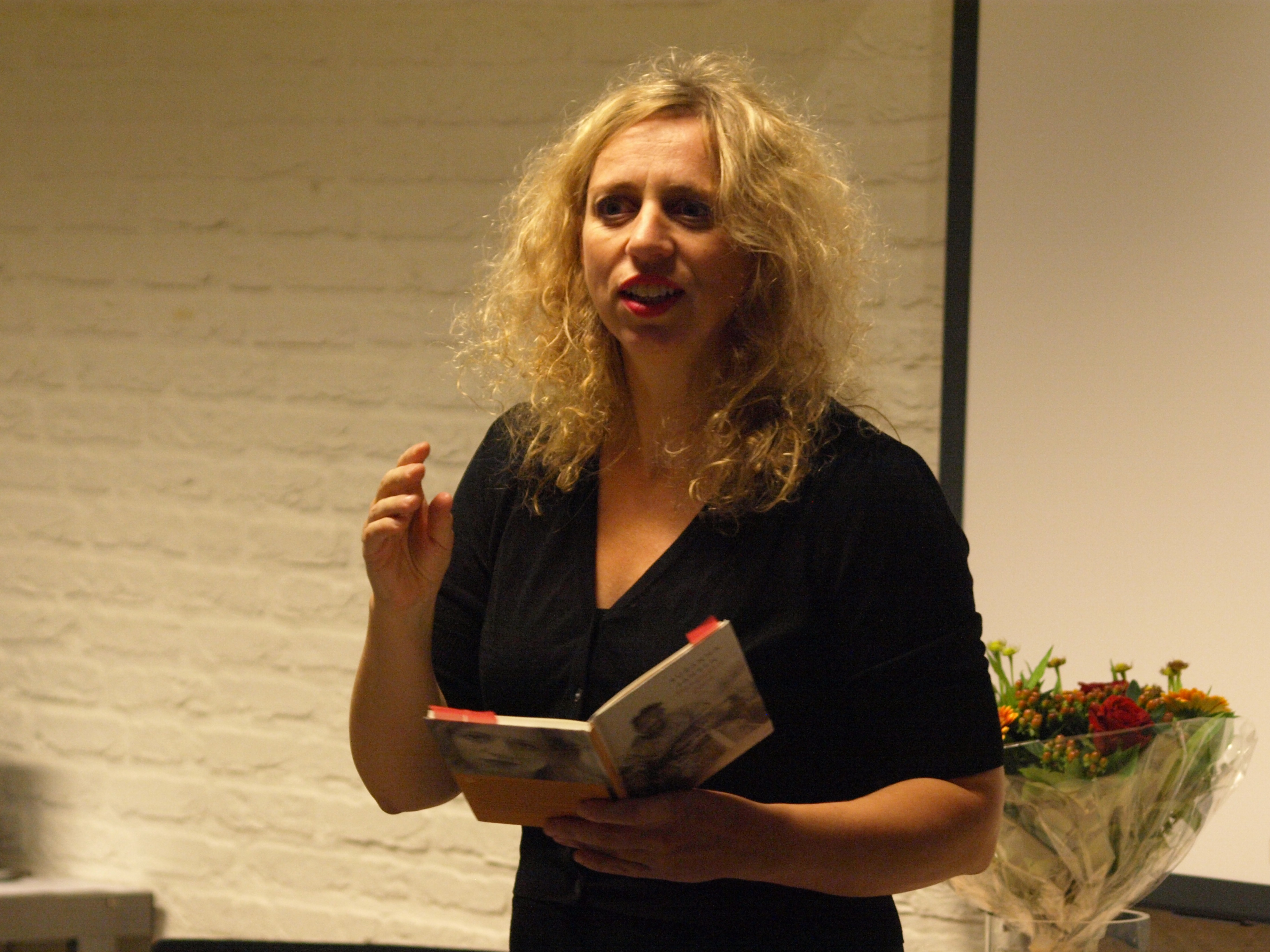 Zie ook